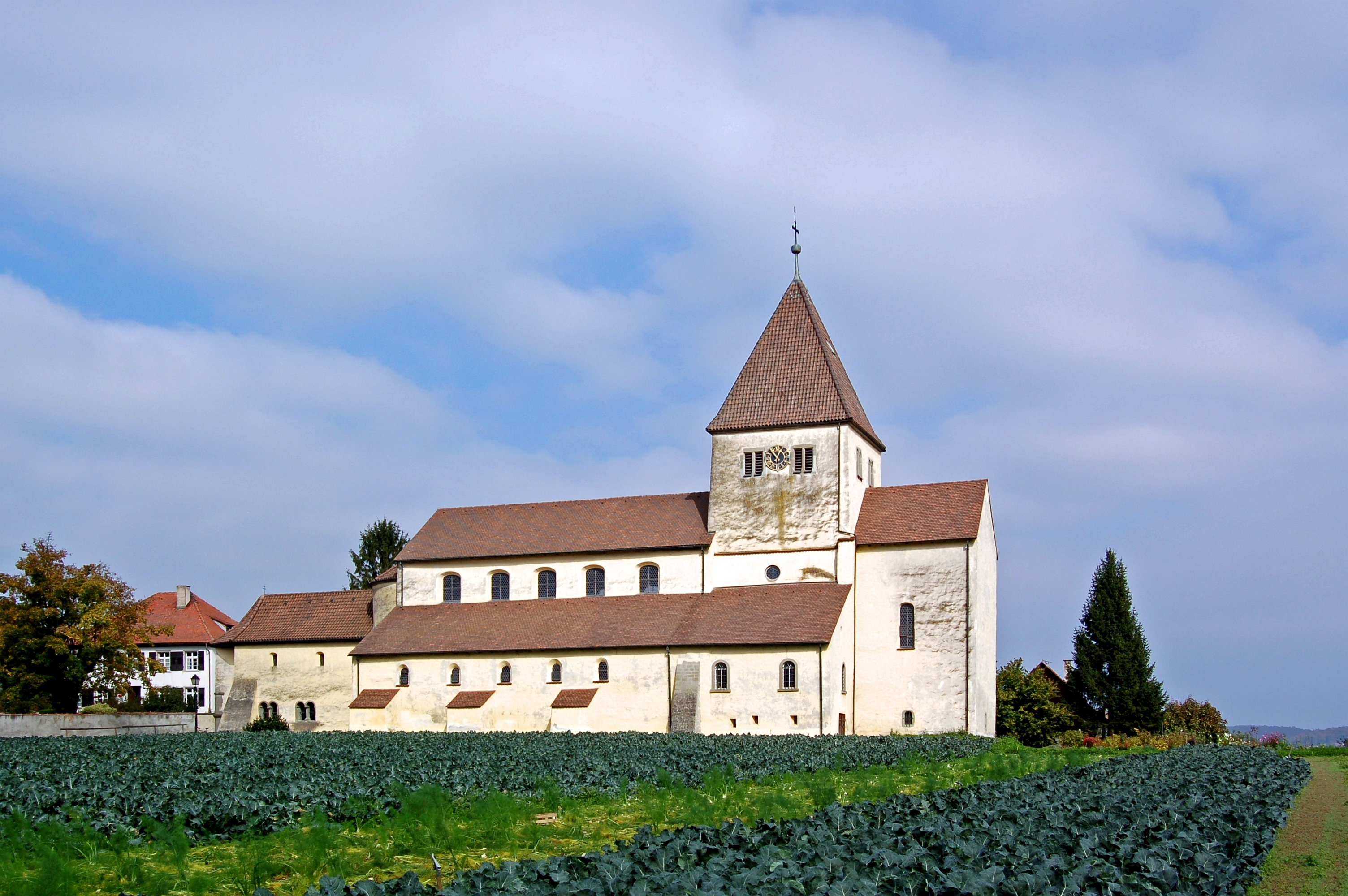 Insel Reichenau - Stiftskirche St Georg in Oberzell